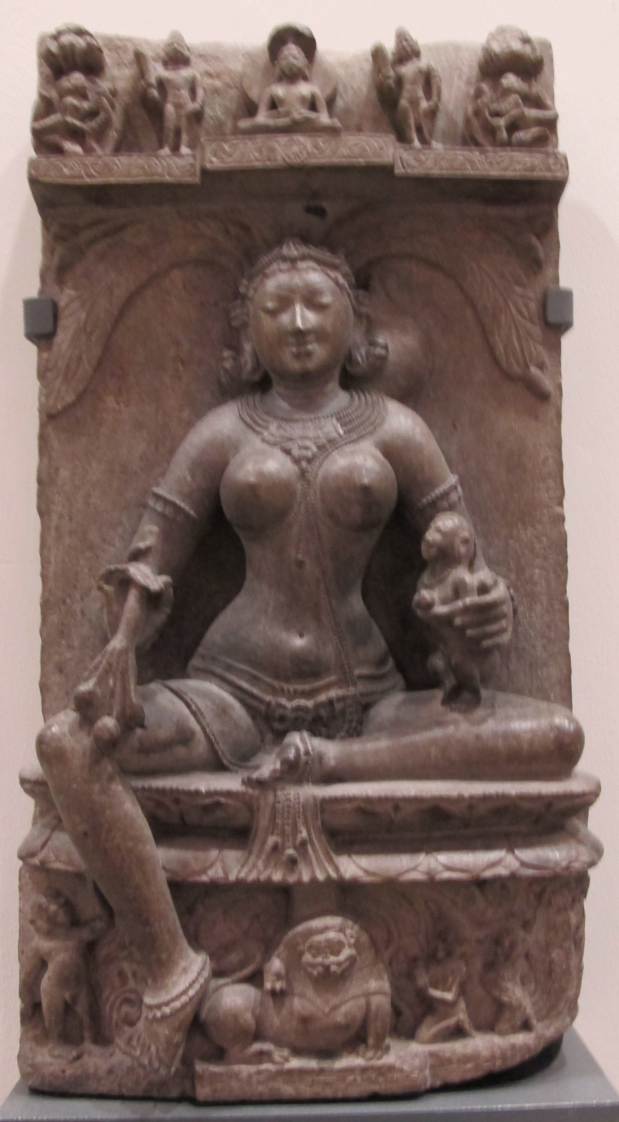 India, orissa, dea ambika, 1150-1200